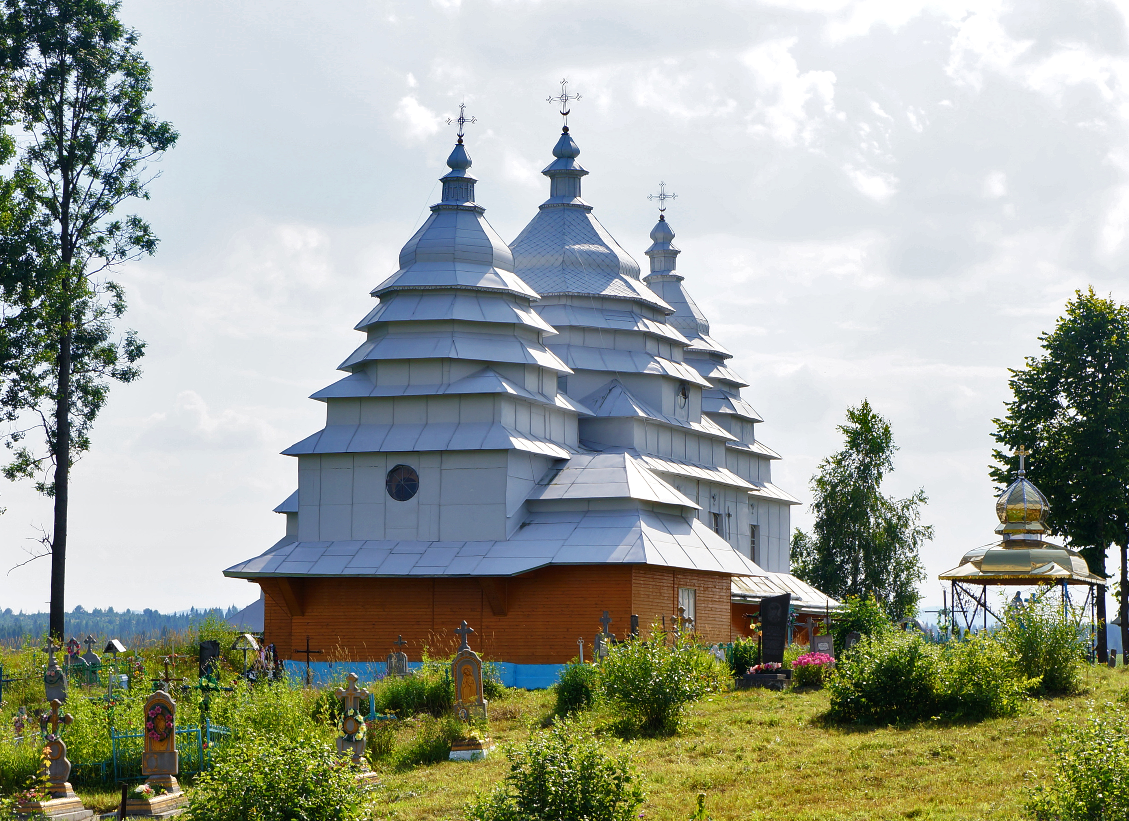 Церква Собору Пресвятої Богородиці (дер.), с.Присліп. фото: ВздовжКарпатська Експедиція, 27.07-28.08.2013